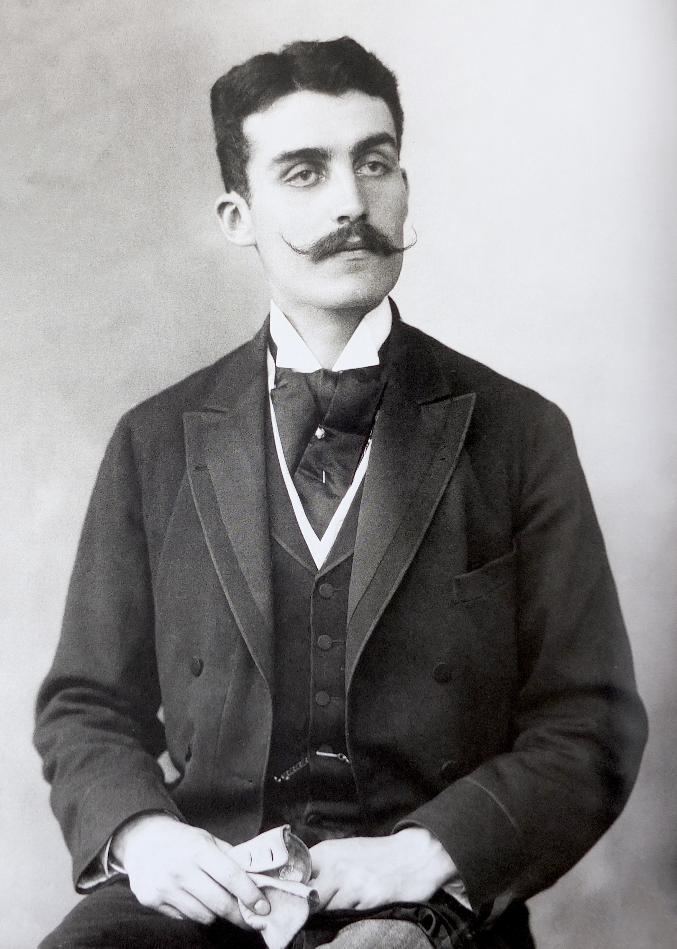 Robert d'Humières (1868-1915), photographié par Paul Nadar le 28 août 1895.